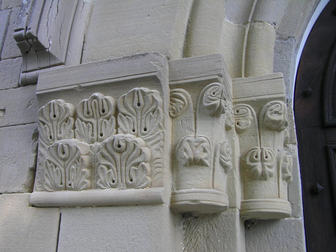 I capitelli finemente scolpiti e perfettamente conservati della chiesa di Santa Maria in Pantano, a Galeata.